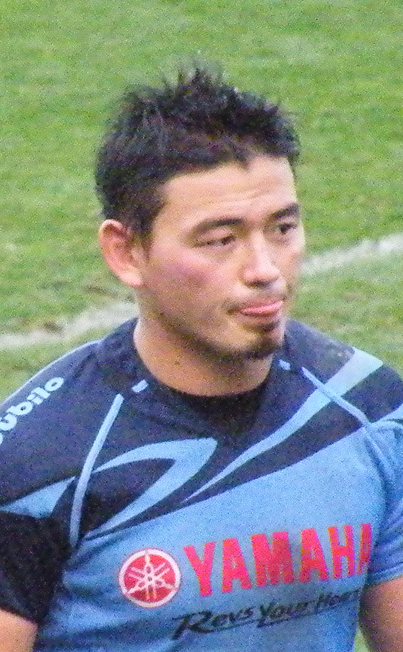 五郎丸歩選手